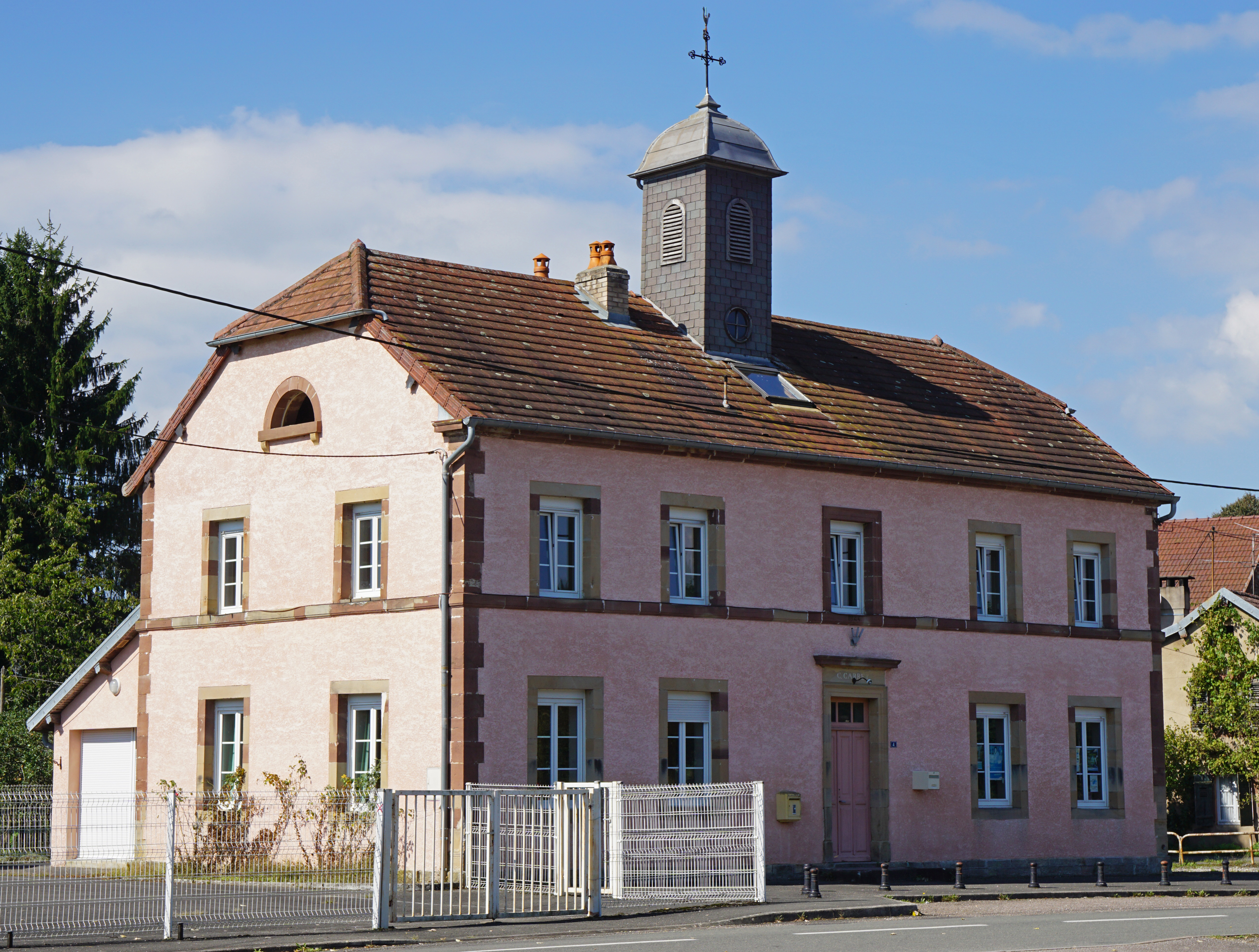 La mairie de Mignavillers.